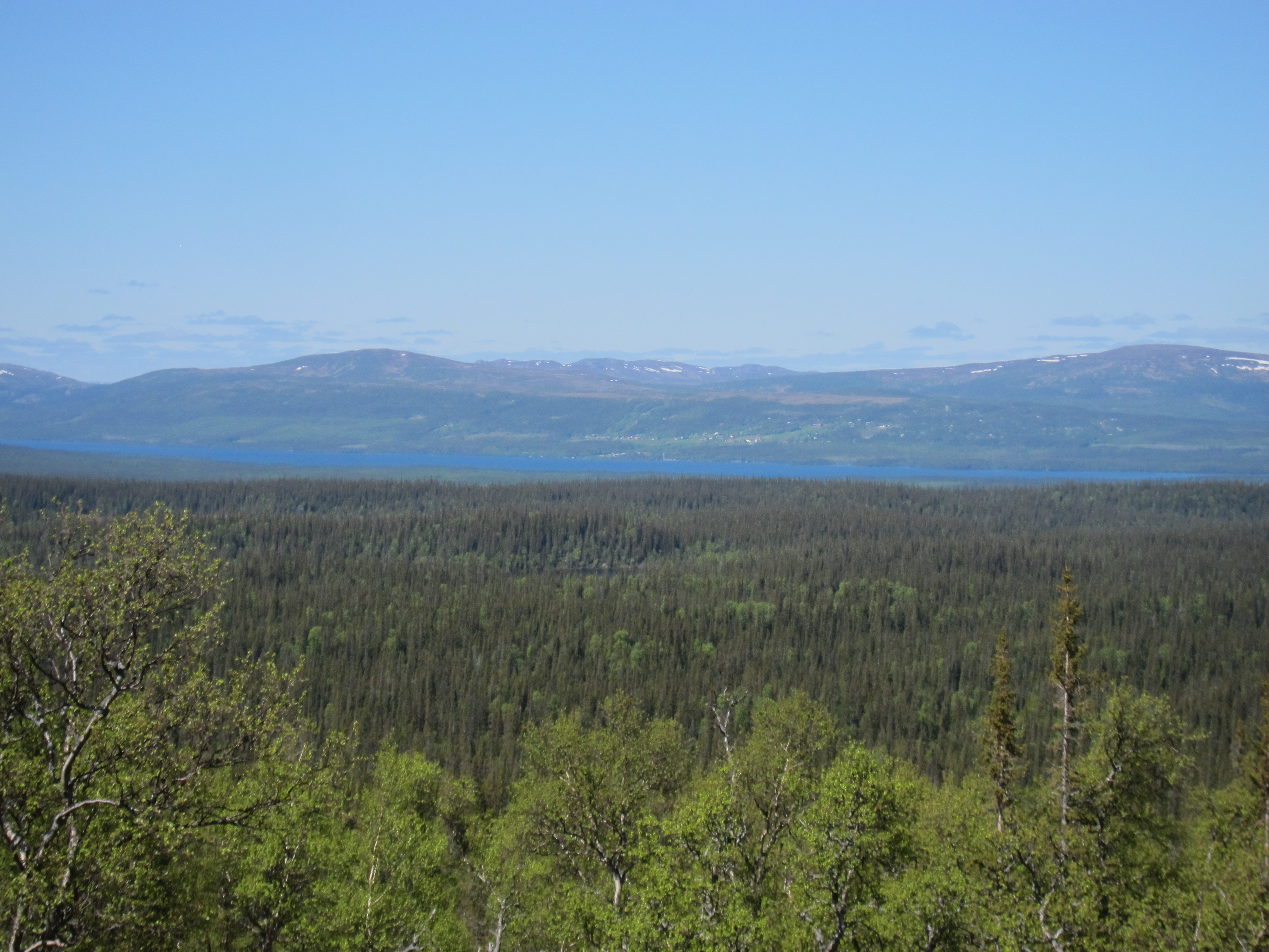 Ottsjön och samhället Ottsjö från söder.